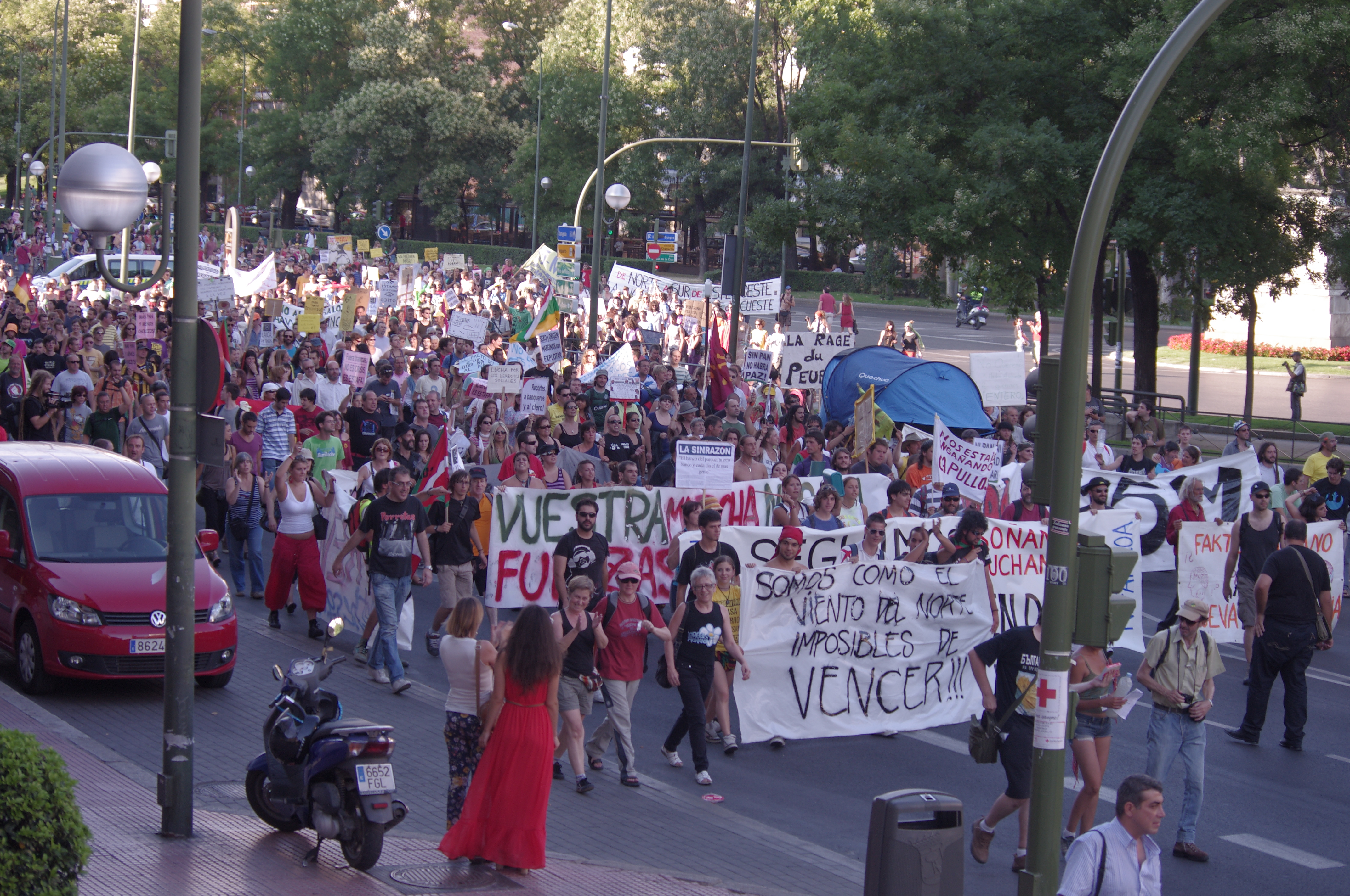 Las marchas procedentes de los distintos puntos de la geografía española recorren las calles de Madrid hasta llegar a Sol. Marcha Norte.